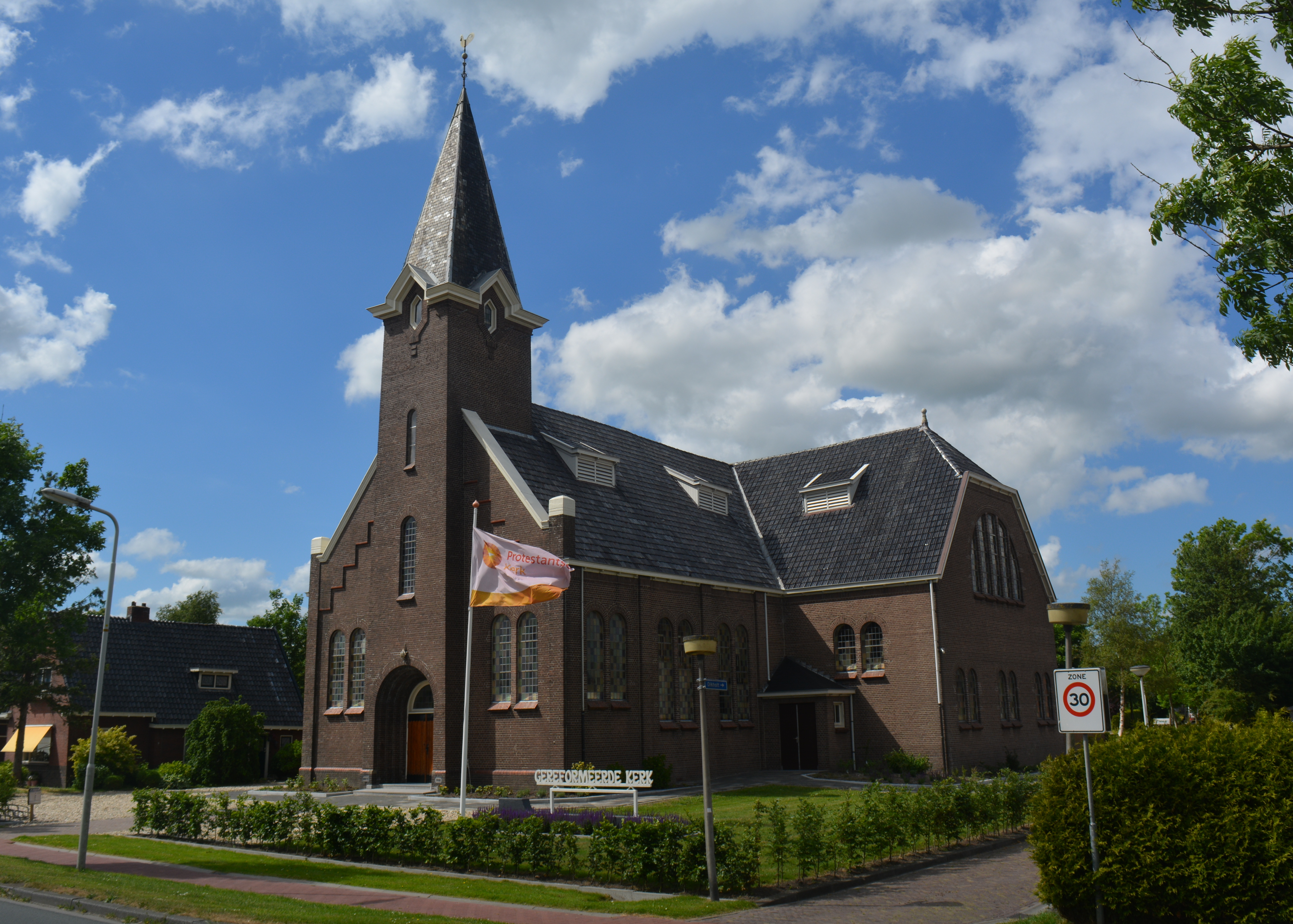 Gerkesklooster, geref. kerk